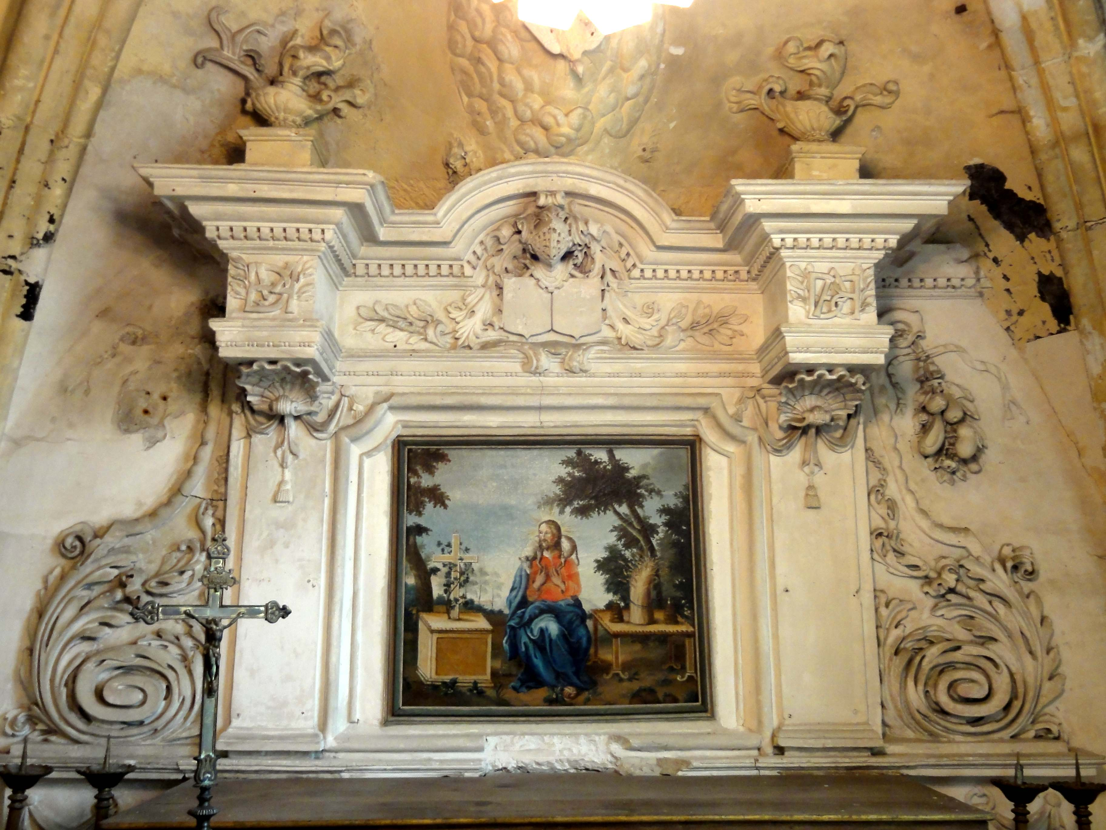 Mobilier de l'église - voir titre.